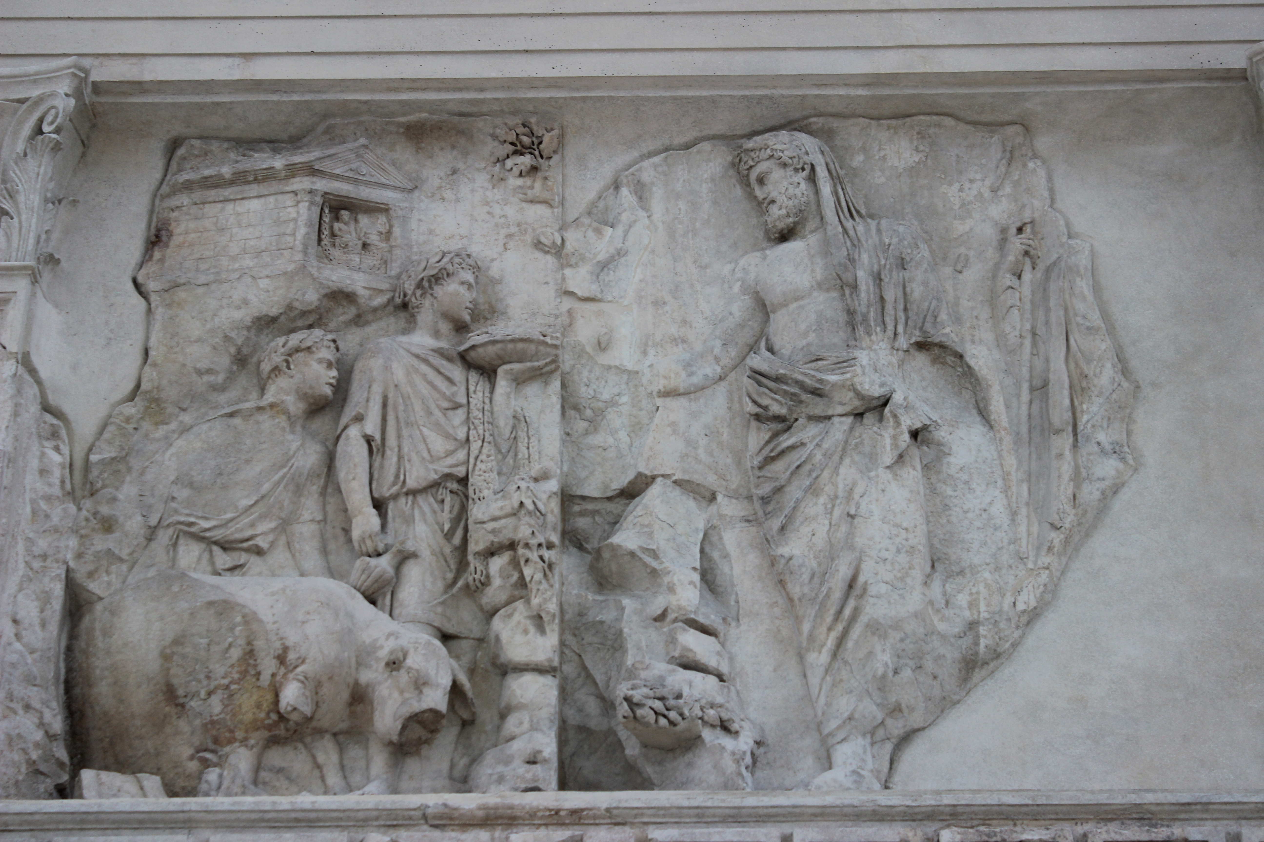 Relieves del exterior del Ara Pacis.